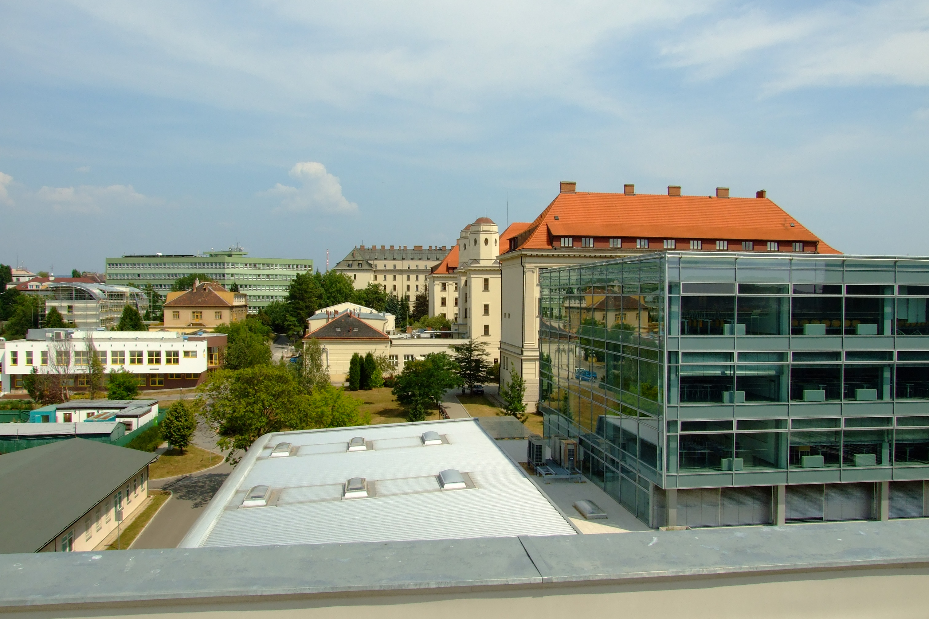 Brno-Černá Pole - budovy areálu Mendelovy lesnické a zemědělské univerzity